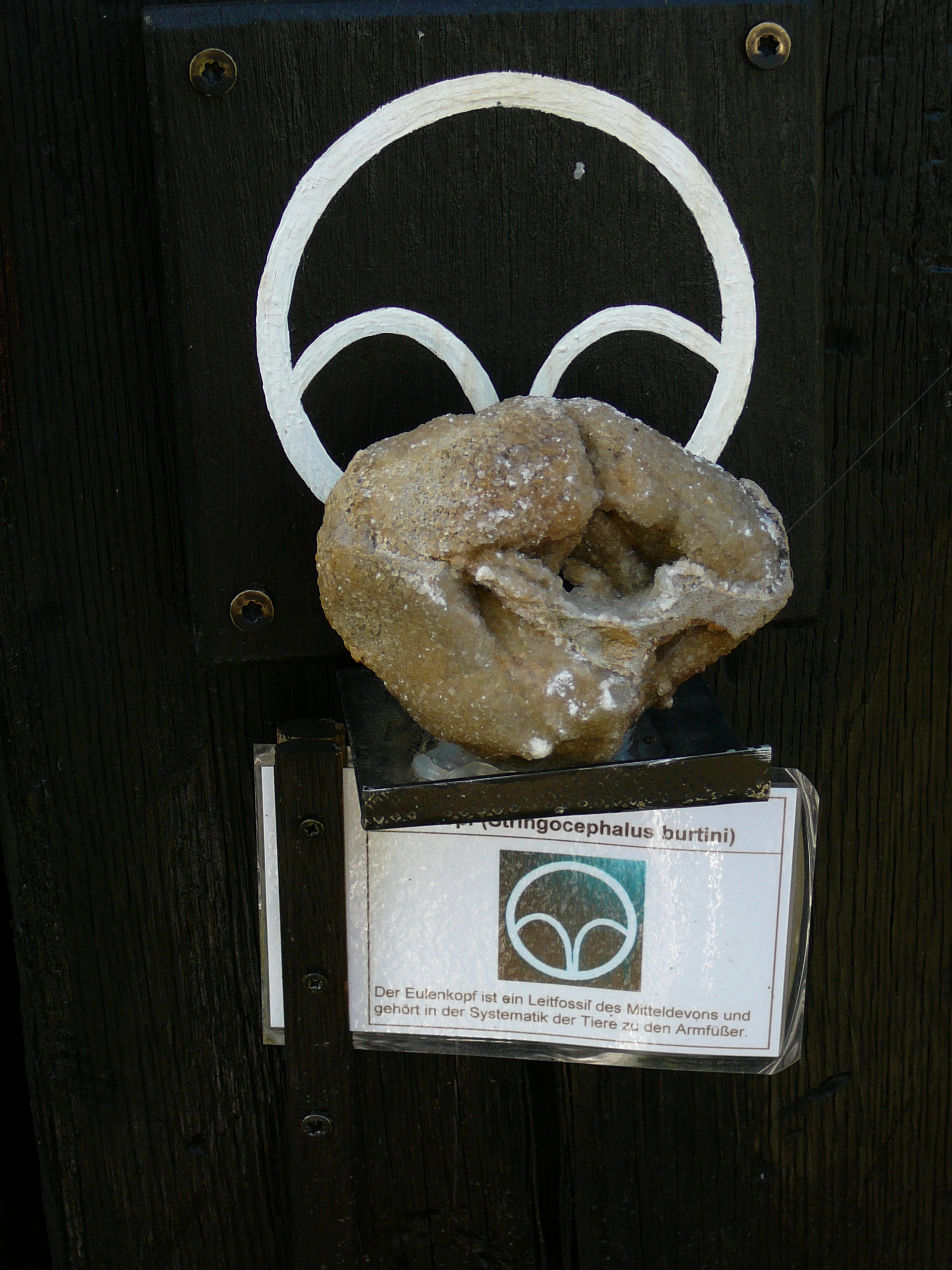 Geologischer Lehrpfad, Heinhauser Weg, Haan